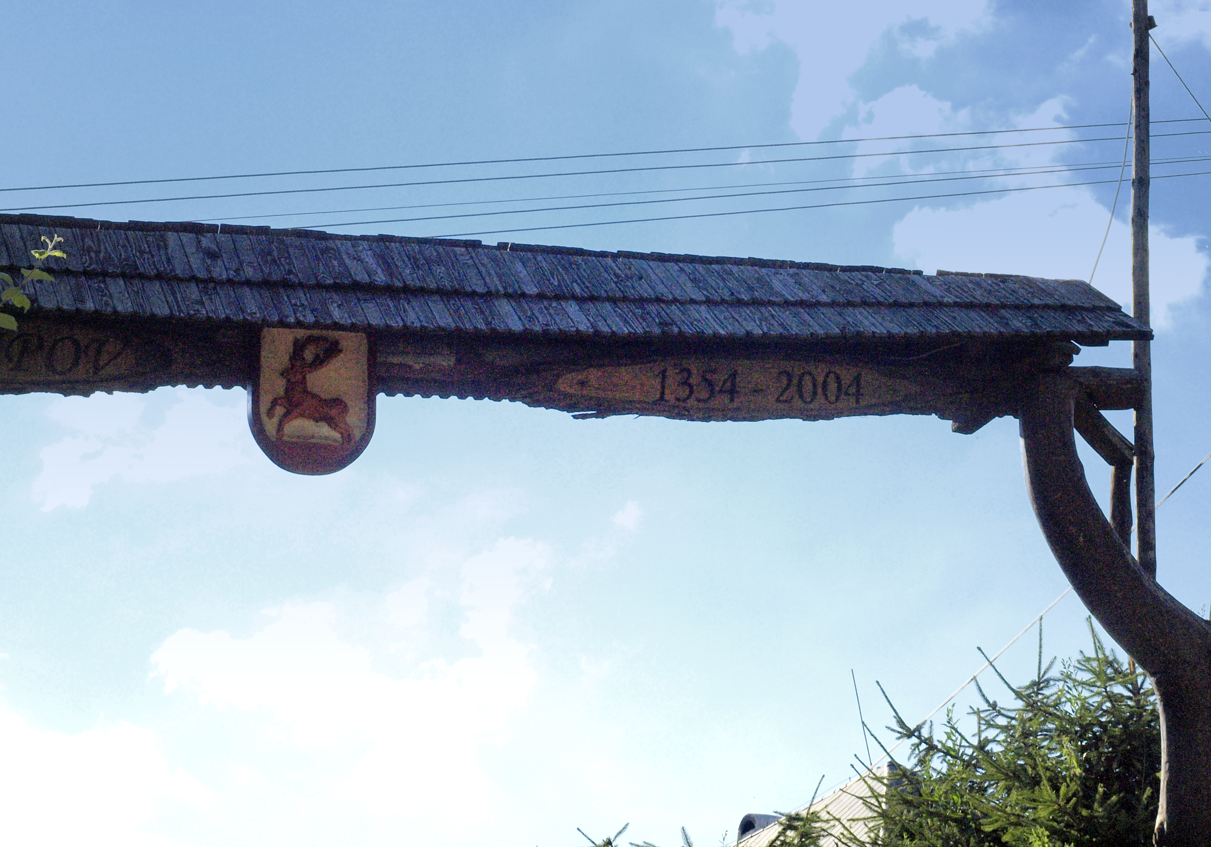 Žipov (Slovakia) - Portique à l'entrée du bureau communal